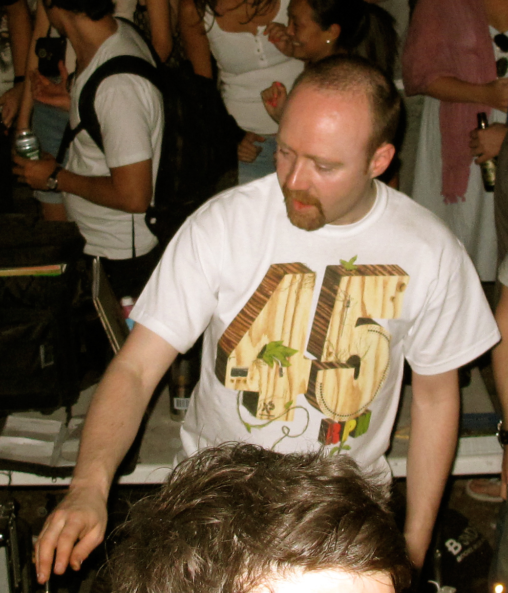 Mr. Scruff in NYC